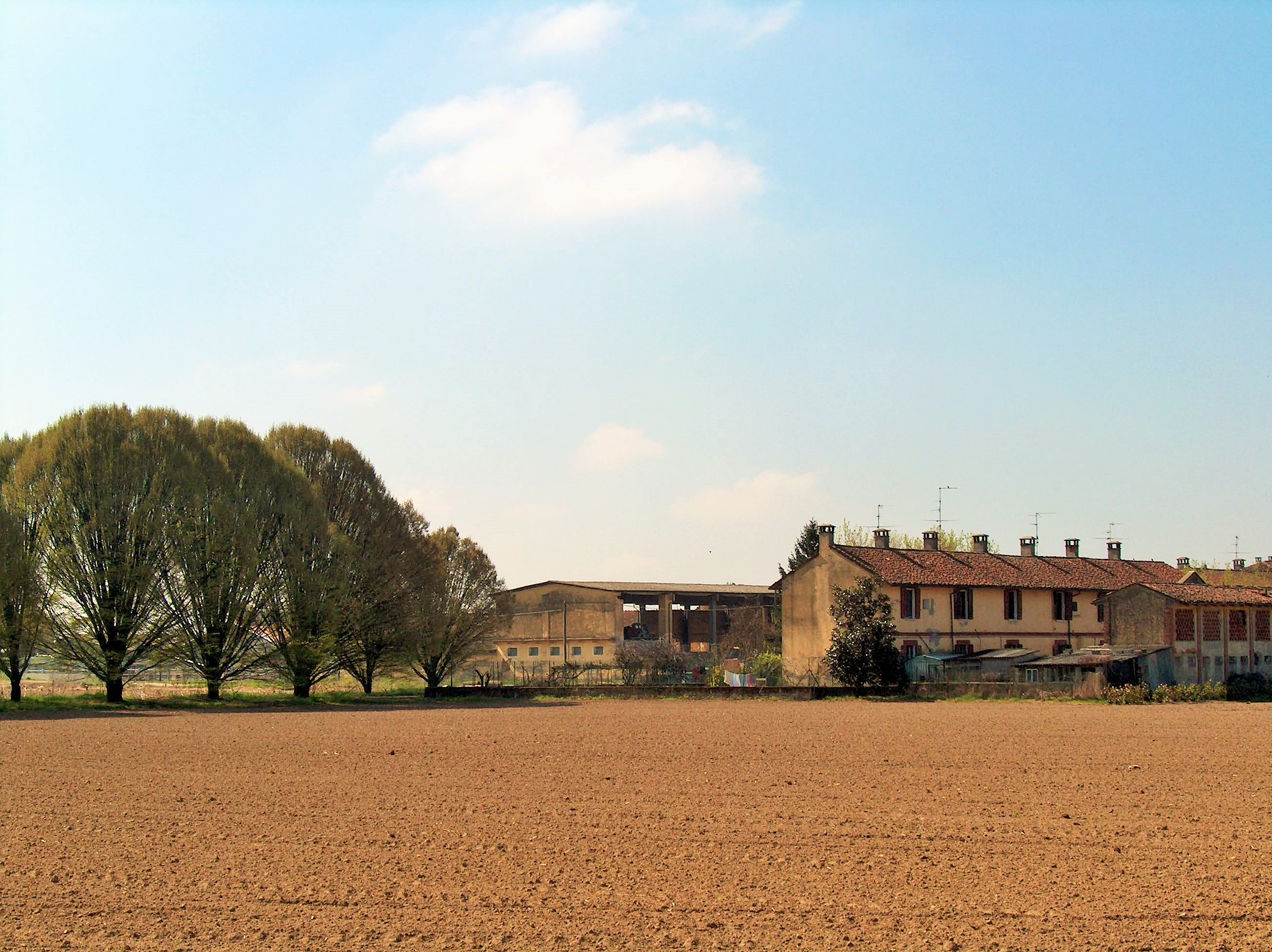 Brembio. Cascina Dossi.